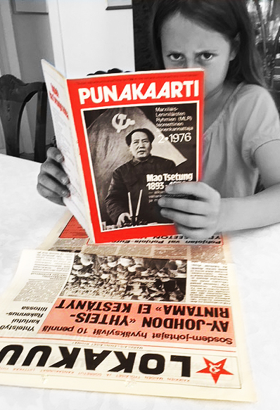 Den finske avisen Lokakuu og tidsskriftet Punakaarti fra 1976